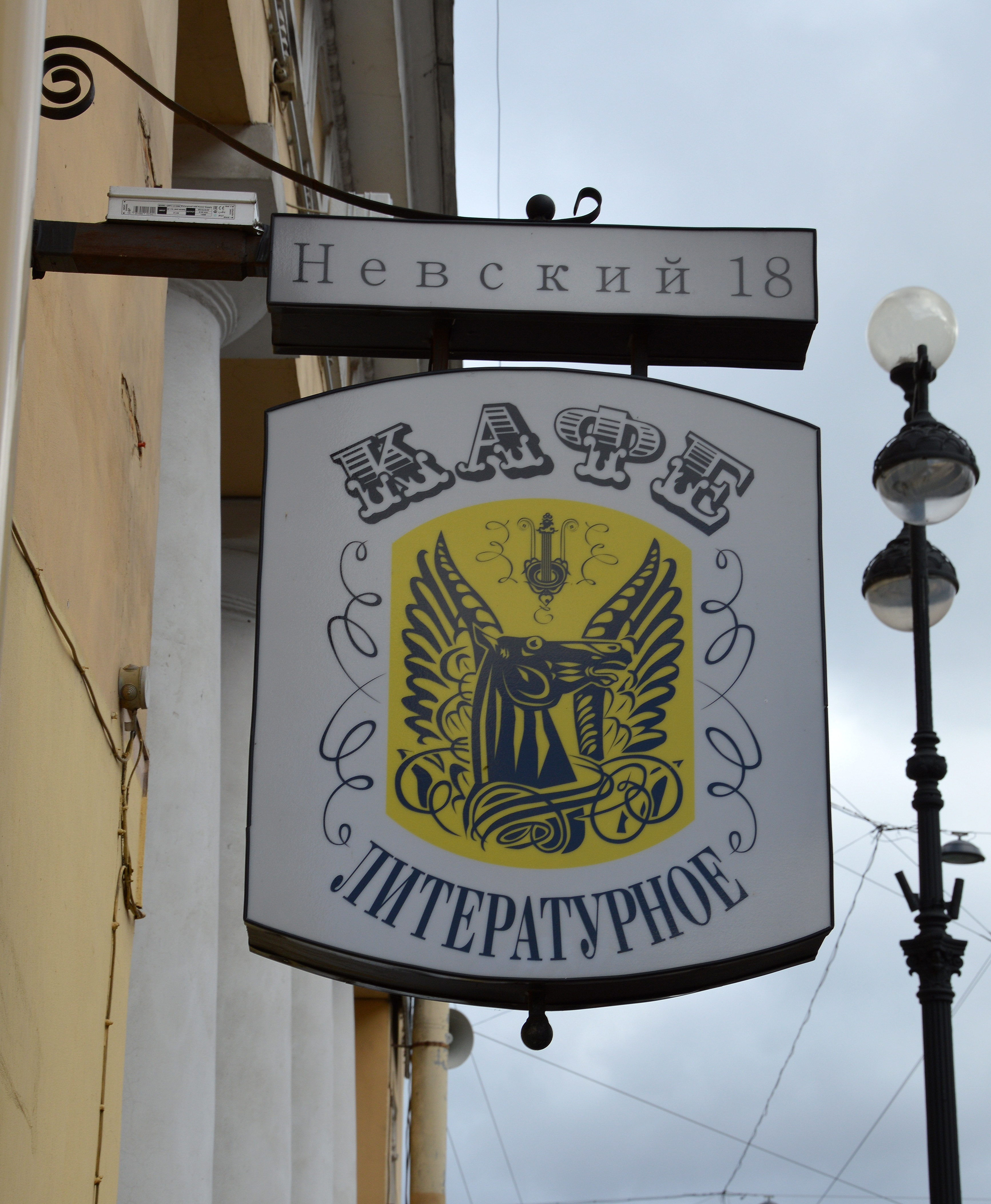 Schild Literaturkaffee Sankt Petersburg